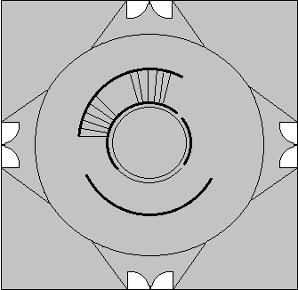 Plano del torreón conocido como el caballero alto en el Castillo de Chapultepec